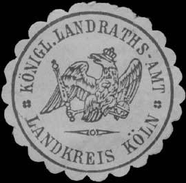 Sealing stamp Title: K. Landraths-Amt Landkreis Köln Description: schwarz, weiß, geprägt Place: Köln size: cm